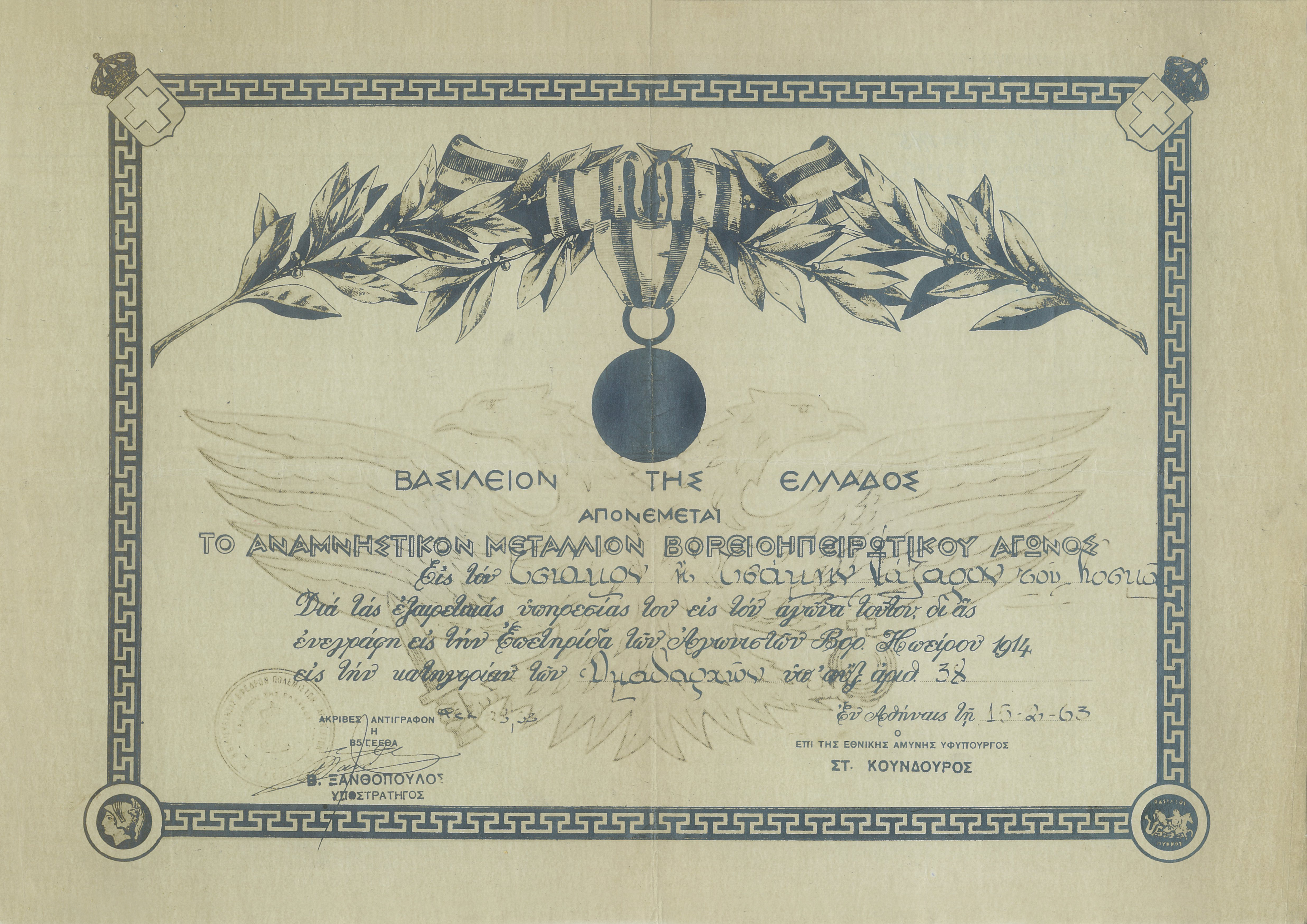 Δίπλωμα Βορειοηπειρωτικού αγώνα